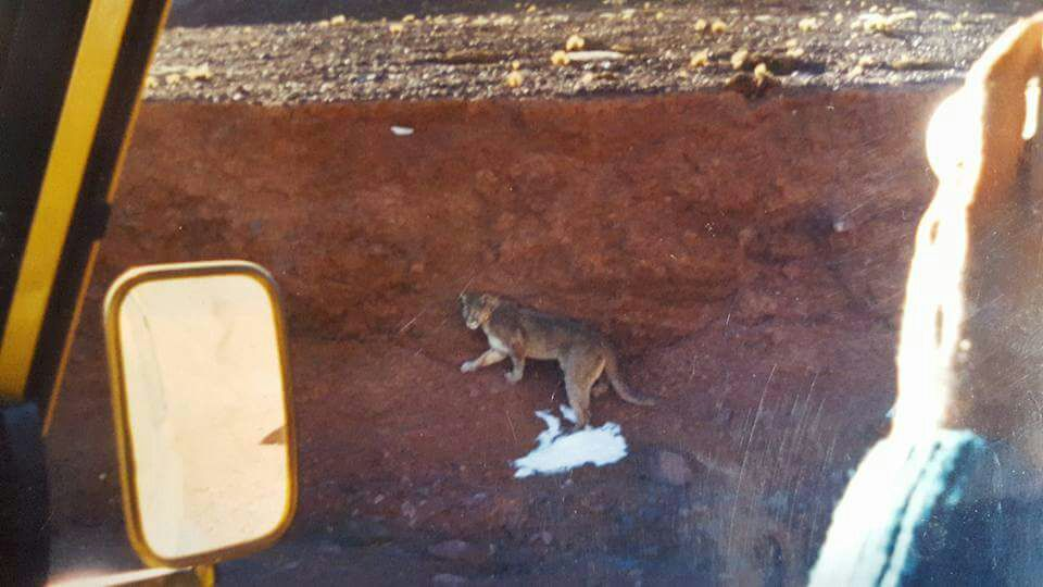 Desde el interior de un vehículo se tomó la fotografía